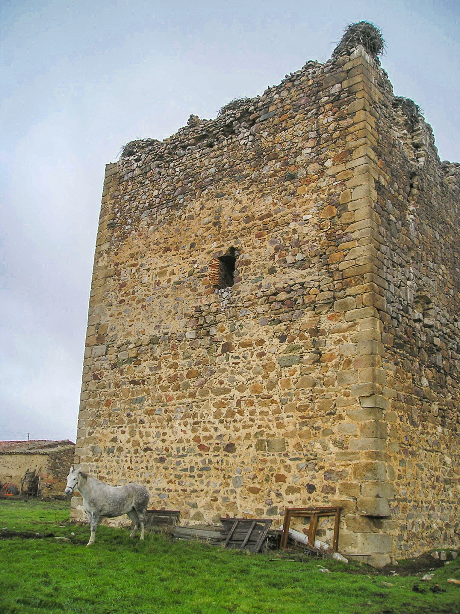 Detalle lateral con ventana del Torreón de Tamames